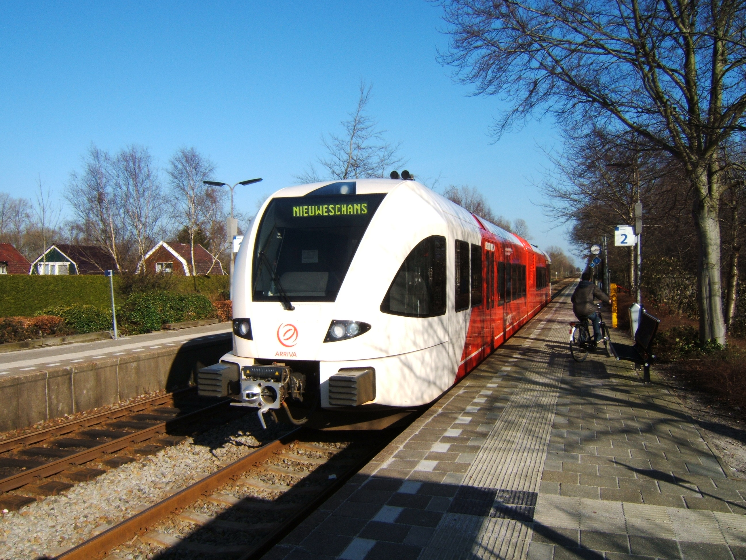 Arrivatrein op de lijn Groningen Nieuweschans in Martenshoek